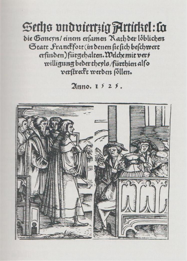 Titelblatt der 46 Artikel vom 22. April 1525, zeitgenössischer Druck. Original in der Universitätsbibliothek Johann Christian Senckenberg. Inhalt abgedruckt in Rudolf Jung, Frankfurter Chroniken und annalistische Aufzeichnungen der Reformationszeit, Frankfurt am Main 1888